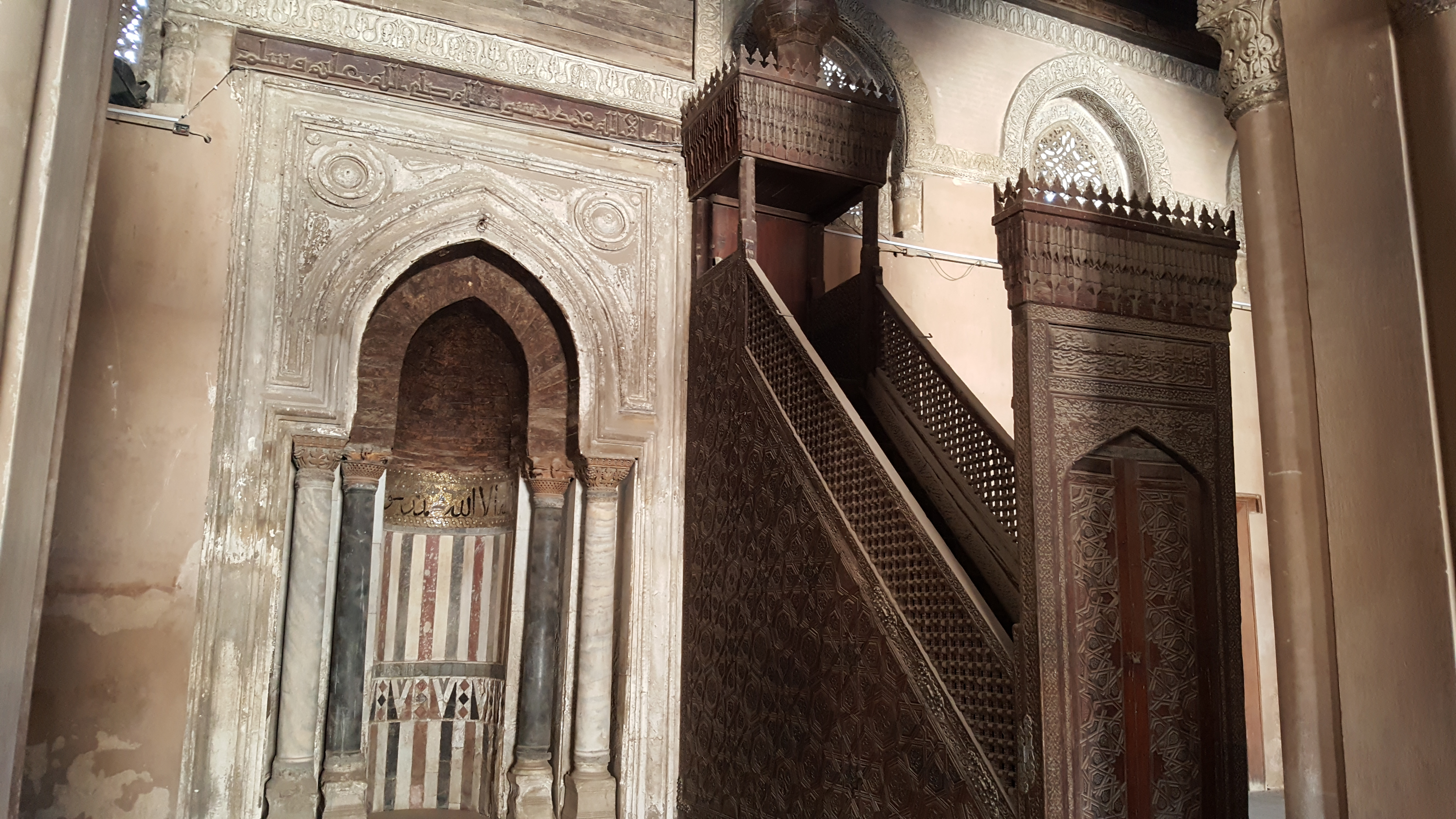 Mosque of Ibn Tulun